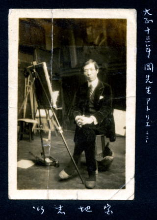 大正十三年岡先生アトリエニテ 宮地志行